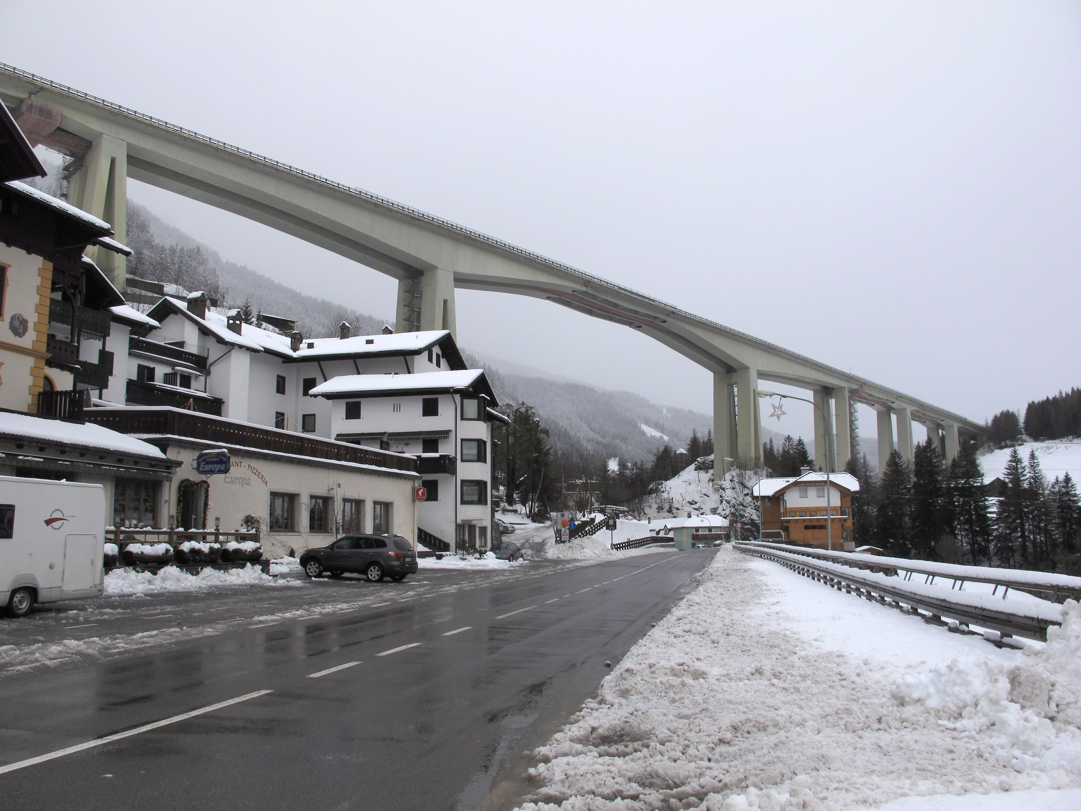 Viadukt der Brennerautobahn in Gossensaß